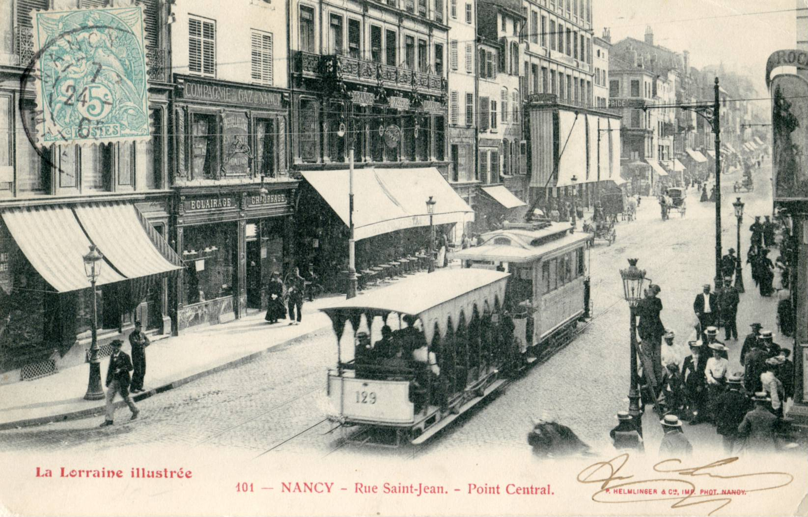 Carte postale ancienne éditée par La Lorraine Illustrée N° 101NANCY - Rue Saint-Jean - Point Central